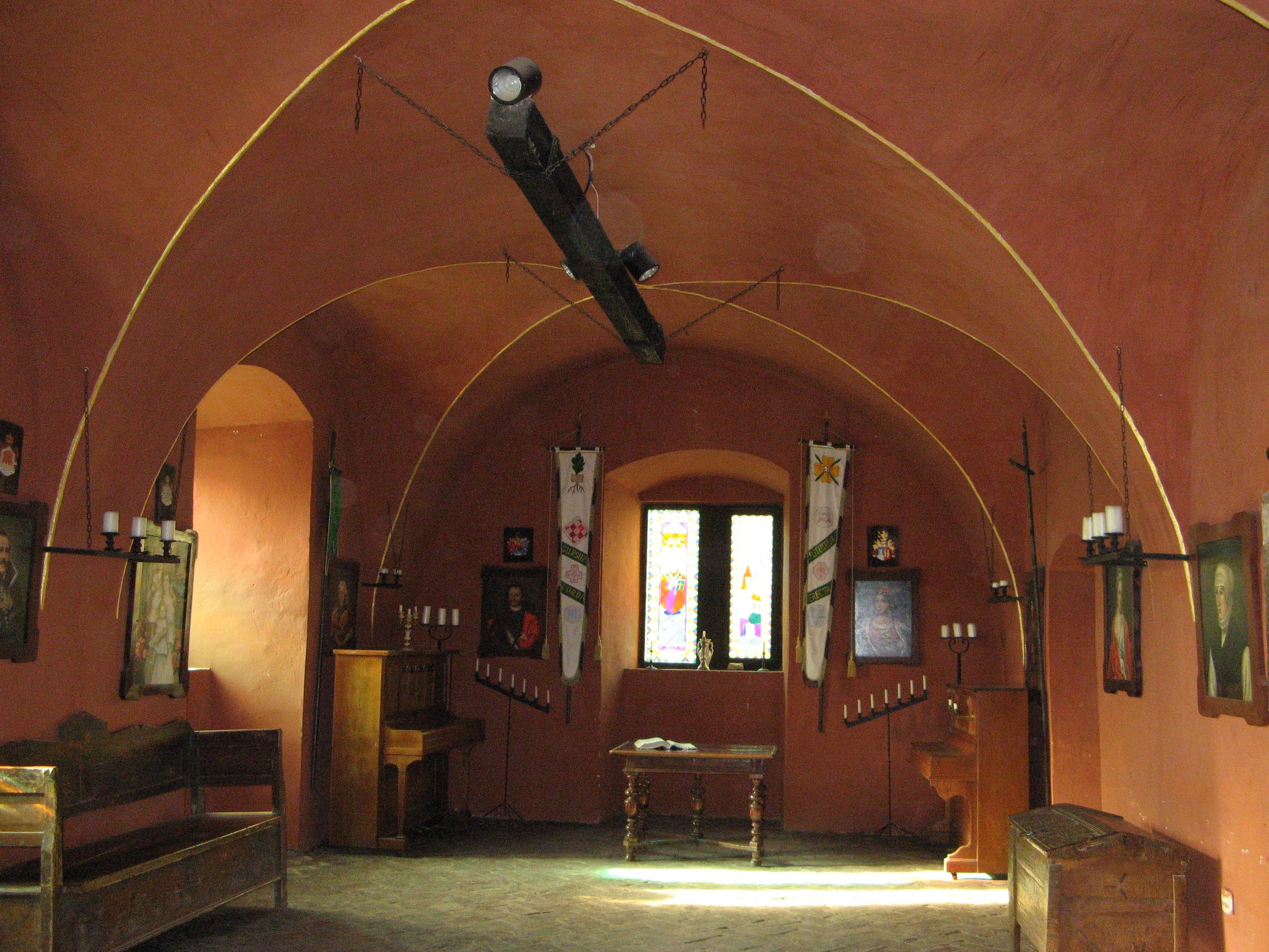 Чинадіївський замок (Закарпатська обл.)